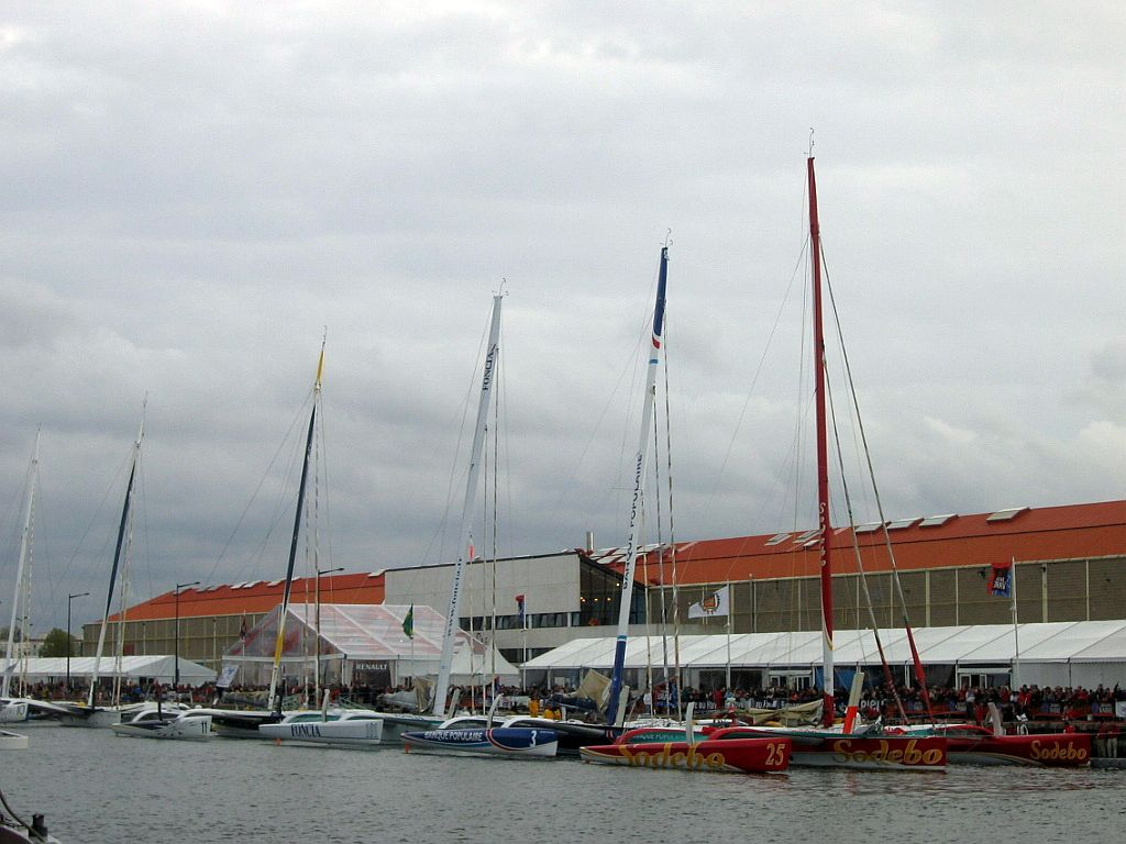 transat Jacques Vabre Le Havre-Salvador de Bahia 2005 Vue générale des multicoques Date : le jour du départ, dimanche 6 novembre 2005, Le Havre, bassin Paul Vatine Photographie prise par l'utilisateur Urban